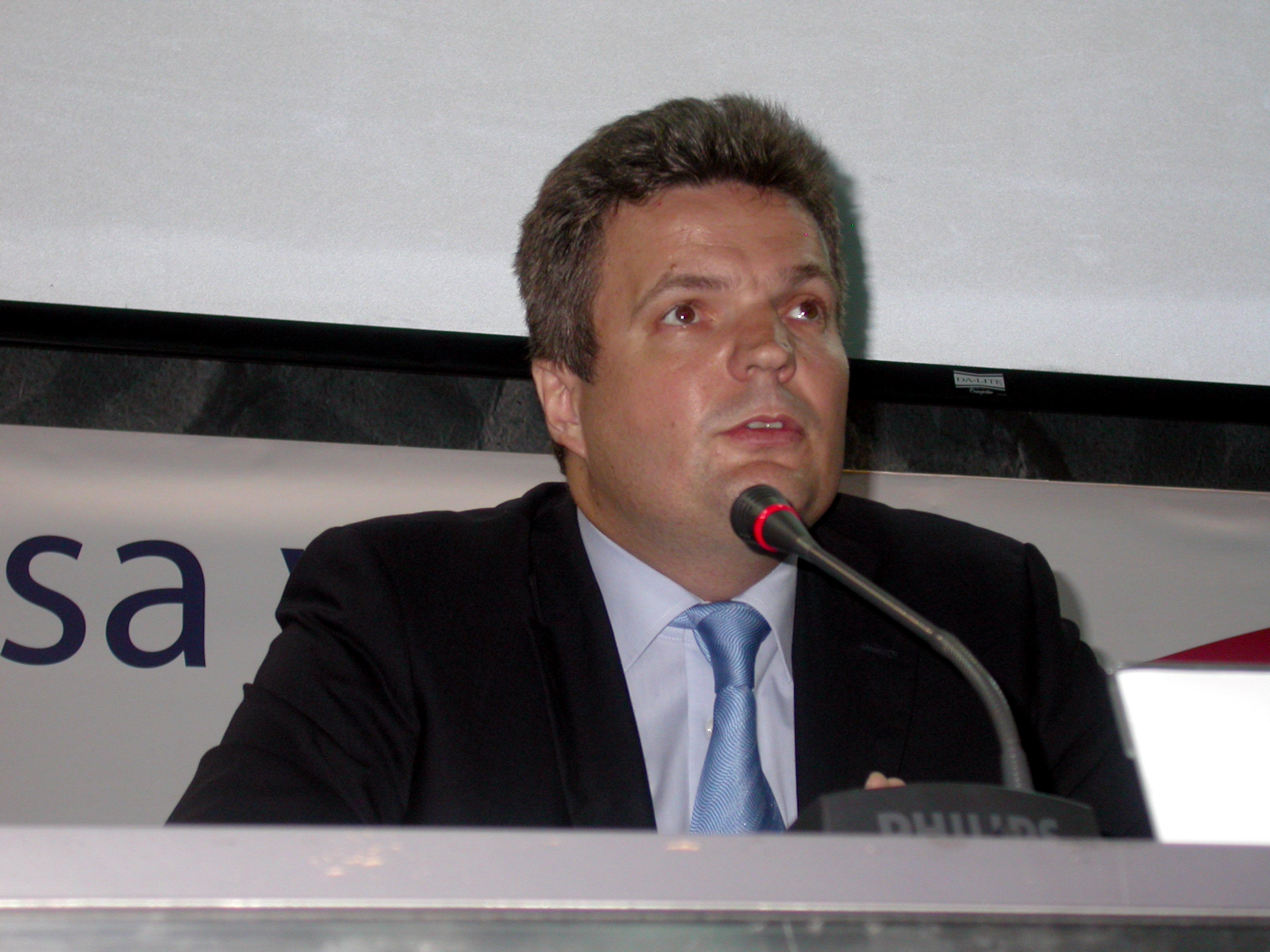 Draško Petrović